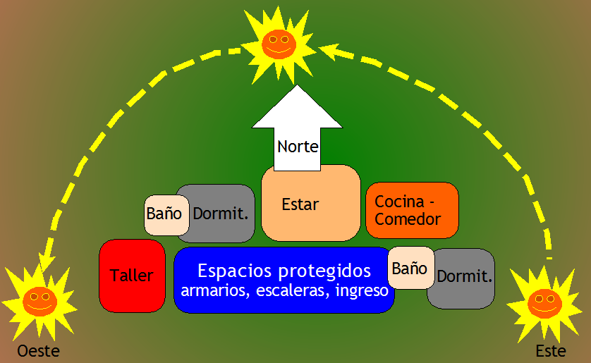 Ubicación de locales en una vivienda respecto a la trayectoria del sol para el hemisferio sur.